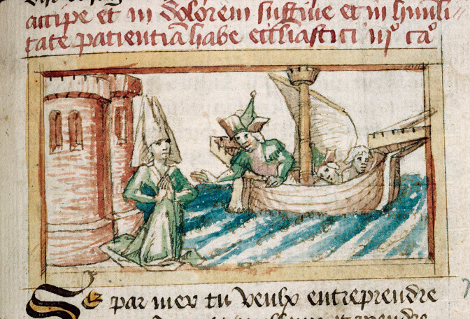 Ceyx prenant congé d'Alcyone. Epitre d'Othea. Lille - BM - ms. 0391 (f. 078)